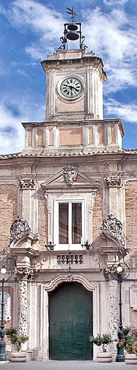 Il portale del palazzo di città di San Severo, già monastero dei padri celestini (sec. XVIII).